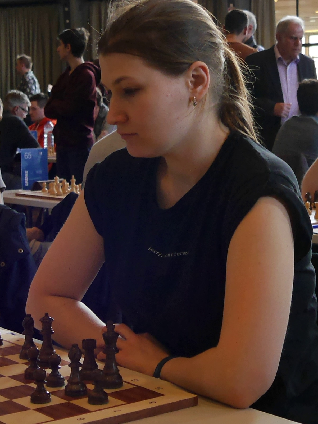 Anastasia Savina, Grenke Chess Open 2018 in Karlsruhe.